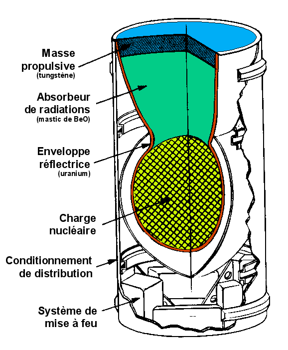 Ceonception d'une unité de propulsion du project Orion